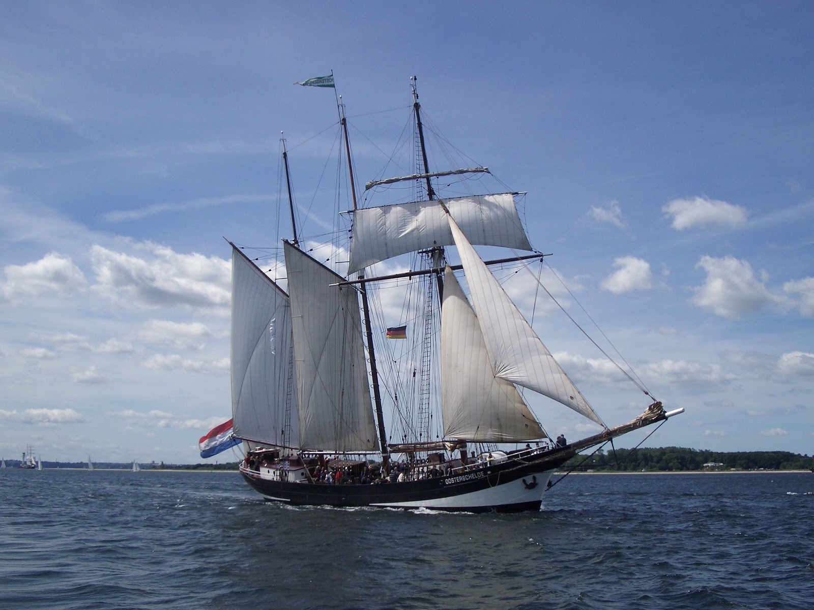 Segelschiff Oosterschelde unter Segeln in der Kieler Förde.